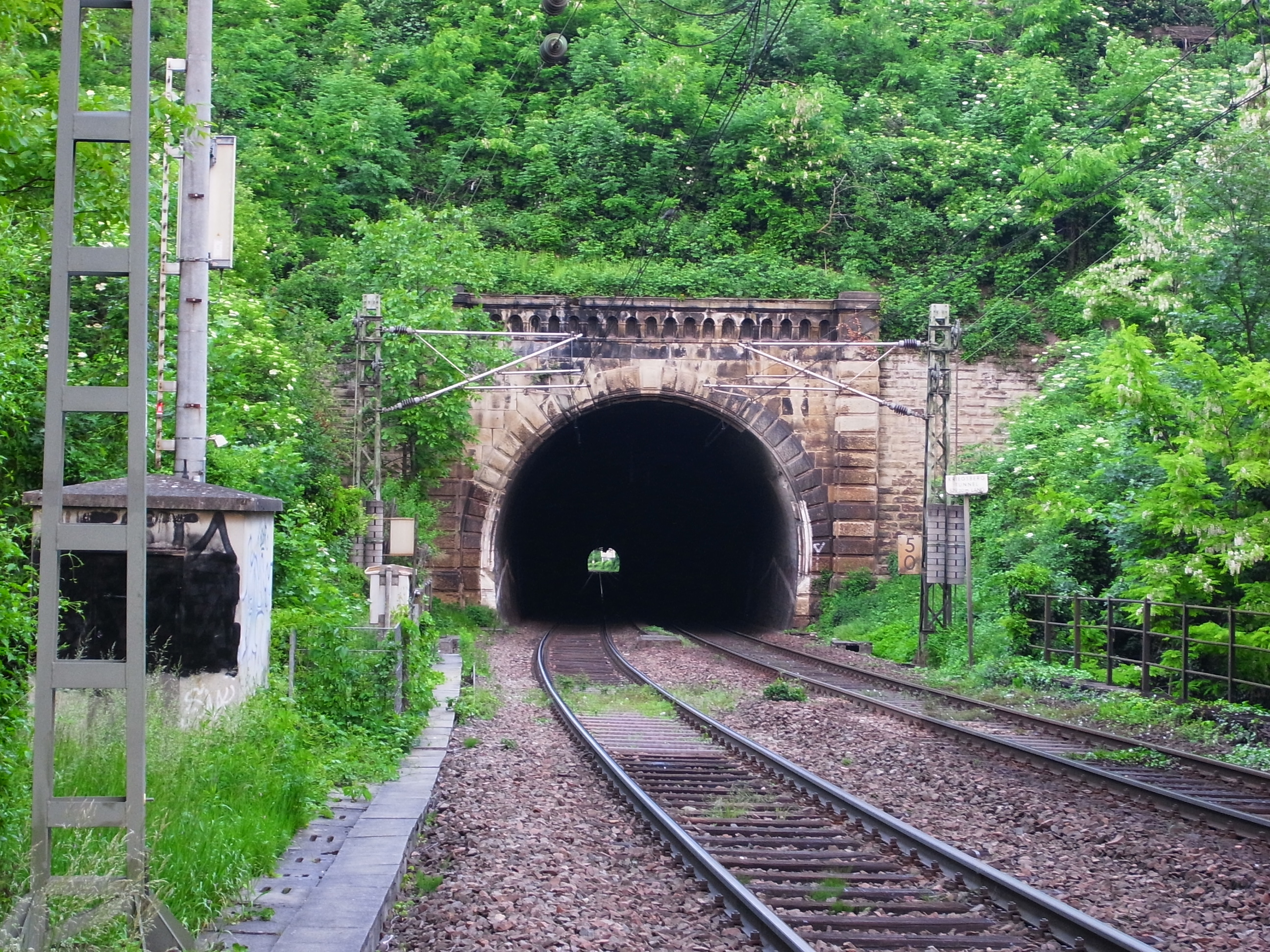 Westportal des Kriegsbergtunnels (Sicht aus der Kurve der Ehrenhalde)